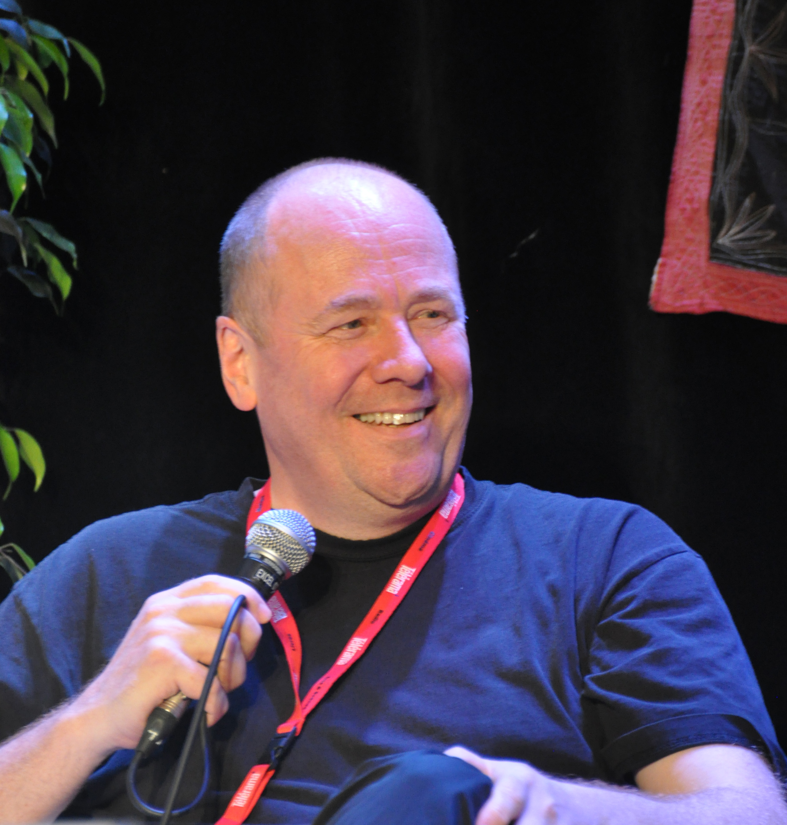 Festival Etonnants voyageurs 2015